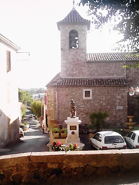 Eglise Saint-Jacques le Majeur de Puget-sur-Argens (83)